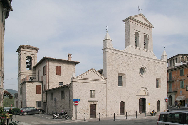 Chiesa S.Maria Assunta Arrone